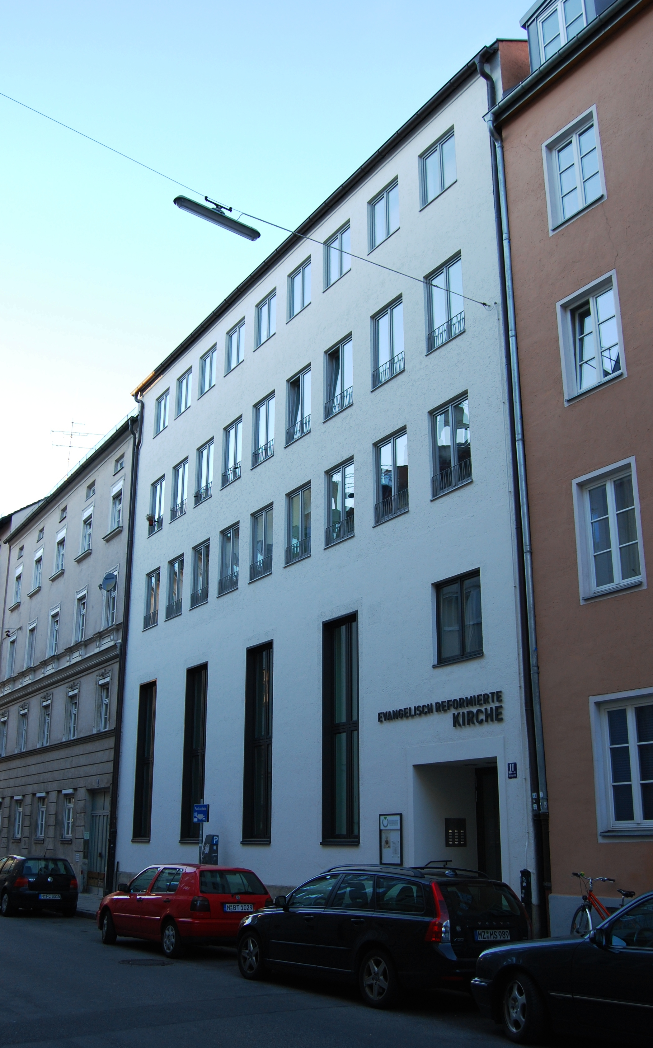 Evangelisch-Reformierte Kirchengemeinde München 1; Reisingerstraße 11 in München-Isarvorstadt